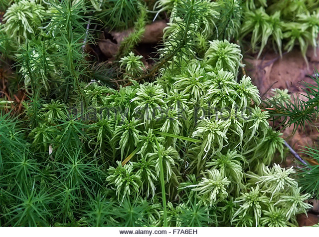 Kormofite